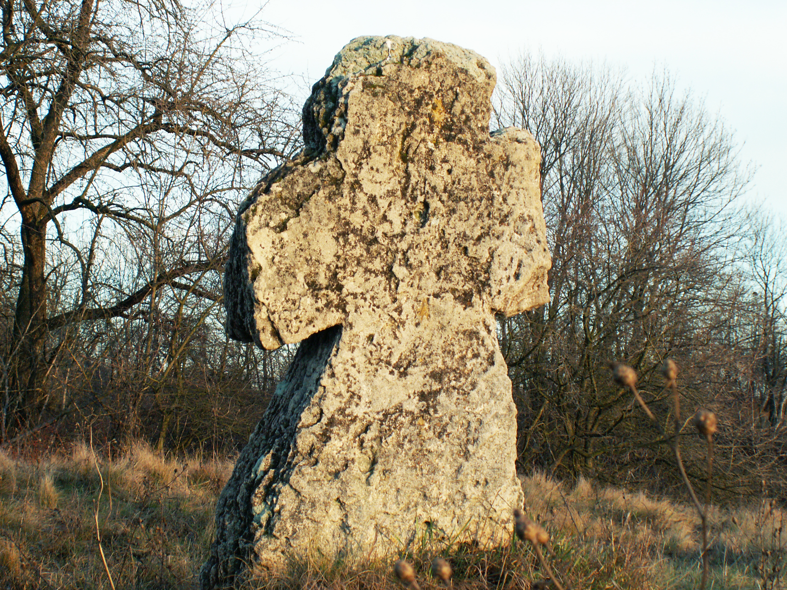 Кам'яний хрест жертвам моровиці в Пилявіі Тиврівського району